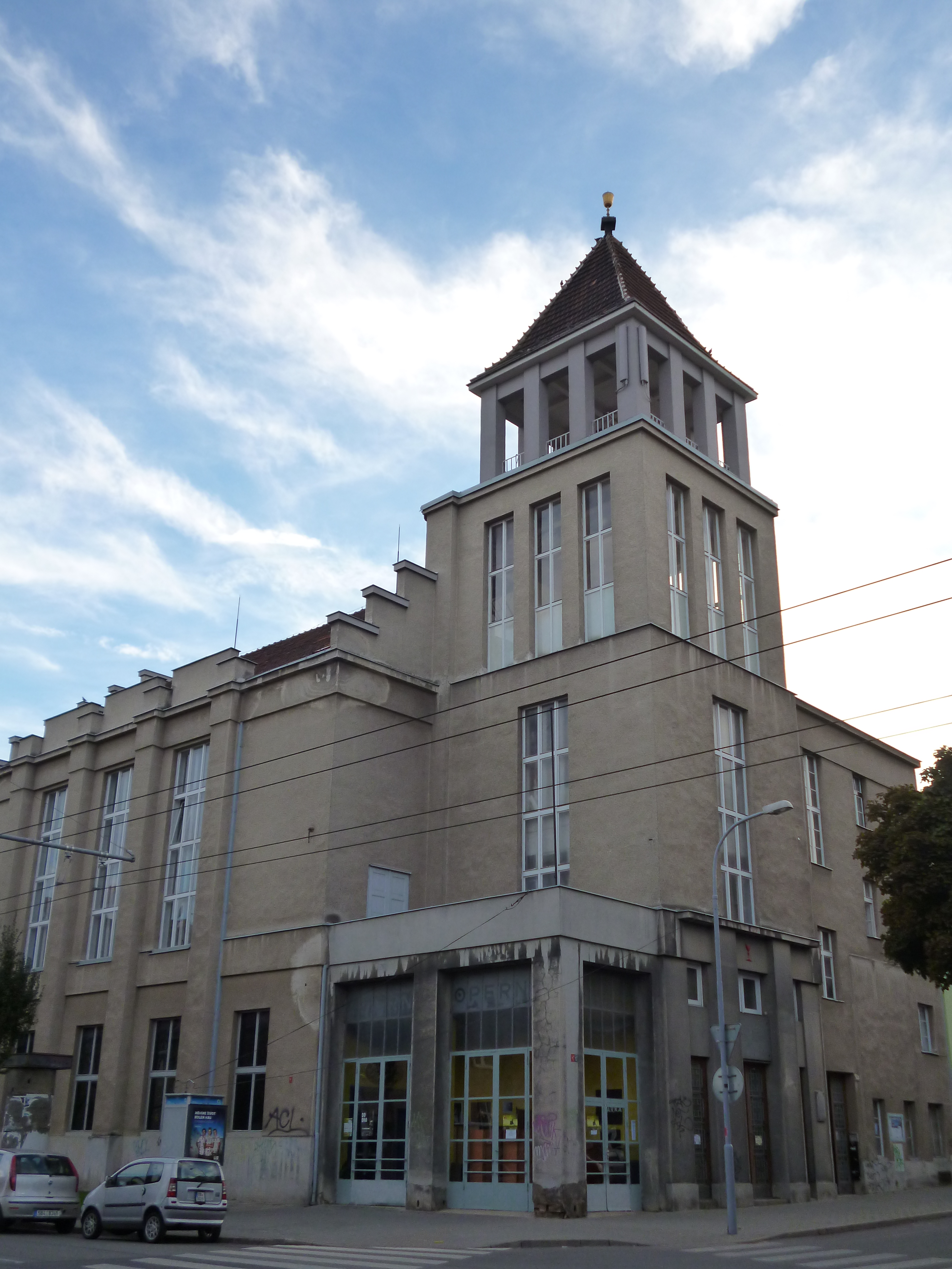 Sbor Husův, z toho jen: průčelí (Brno), Královo Pole, Svatopluka Čecha 35a 1405/35, Brno